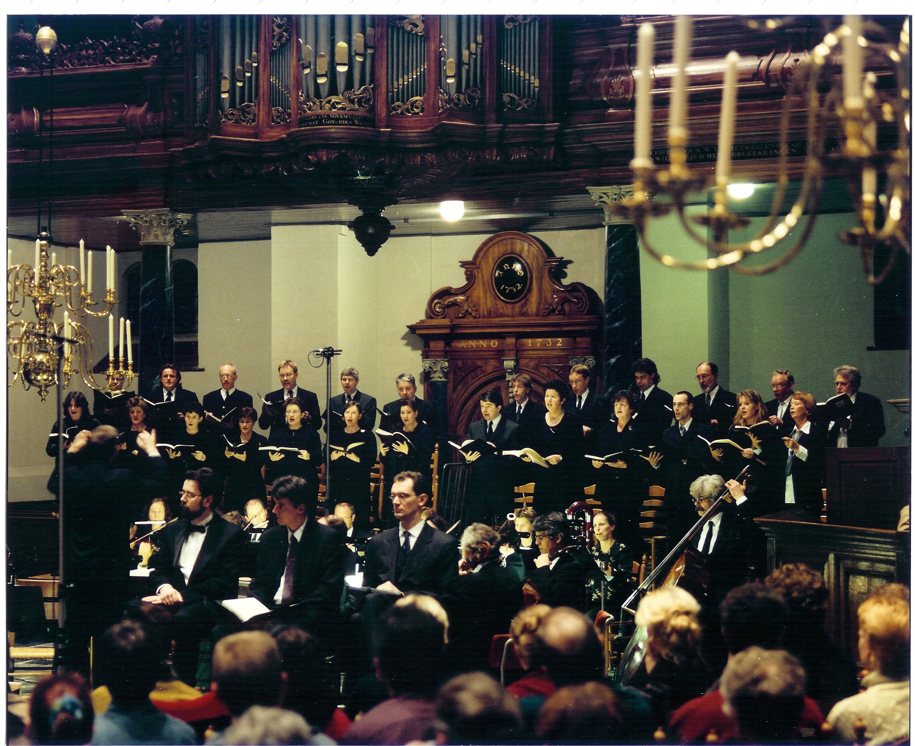 foto van Musica Vocalis Scyedam